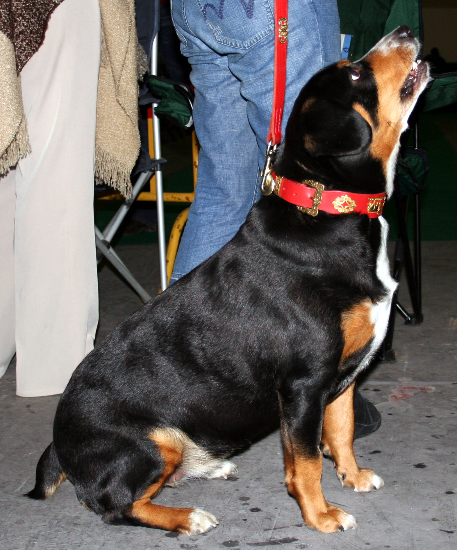 Entlebucher na Światowej Wystawie Psów Rasowych w Poznaniu